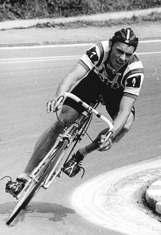 Uwe Ampler ADN-ZB Kasper 29.7.84 Bez. Gera: DDR-Meister im Straßenradsport wurde auf dem Schleizer Dreieck der Leipziger Uwe Ampler. Der Sportler vom SC DHfK Leipzig - hier in der Haarnadelkurve des Kurses - legte die 167,2 km in 4:20:50,6 h zurück.